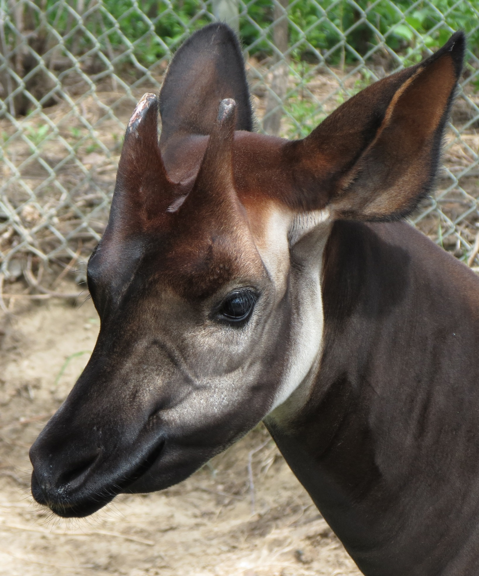 okapi closeup, Denver Zoo, Colorado / 2013